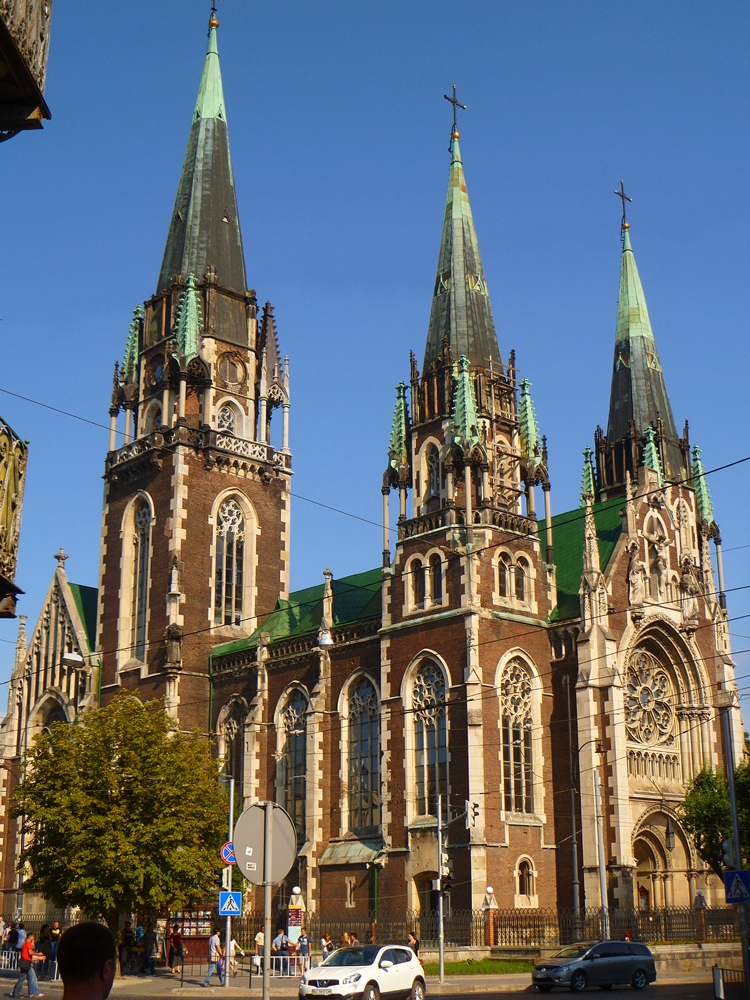 Церква свв.Ольги та Єлизавети